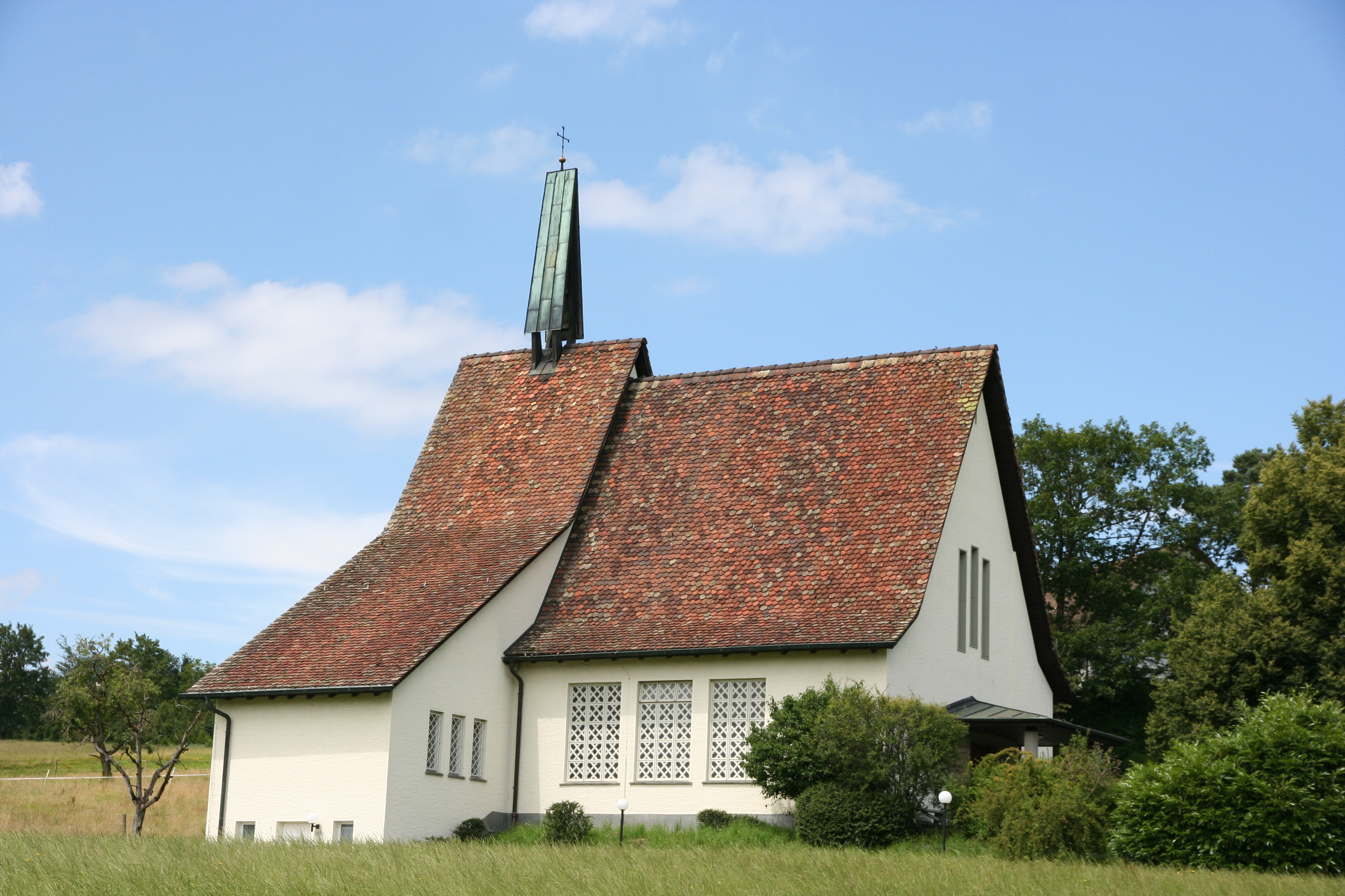 Römisch-katholische Kapelle St. Anna Wädenswil, Aussenansicht